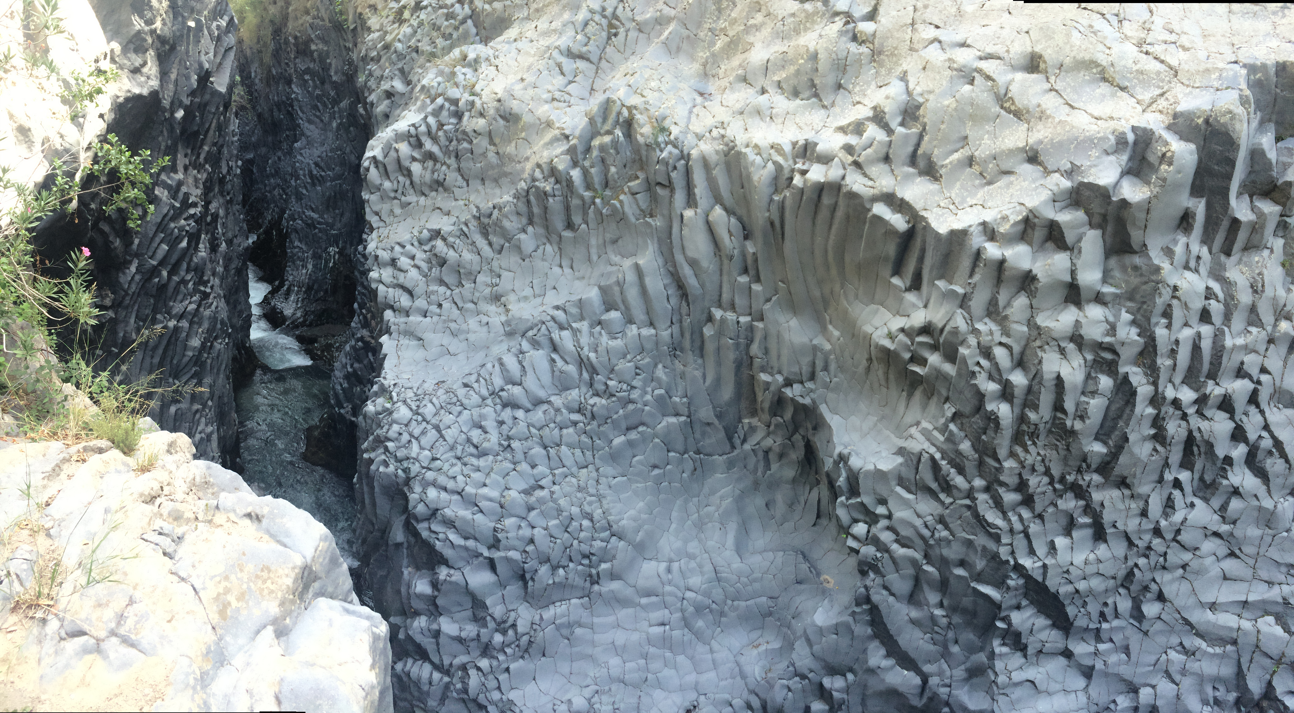 Alcantara Gorge.